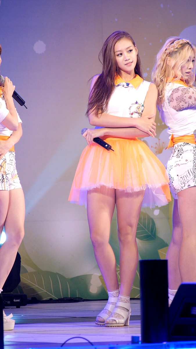 130905 포천 경인방송 한마음위문공연